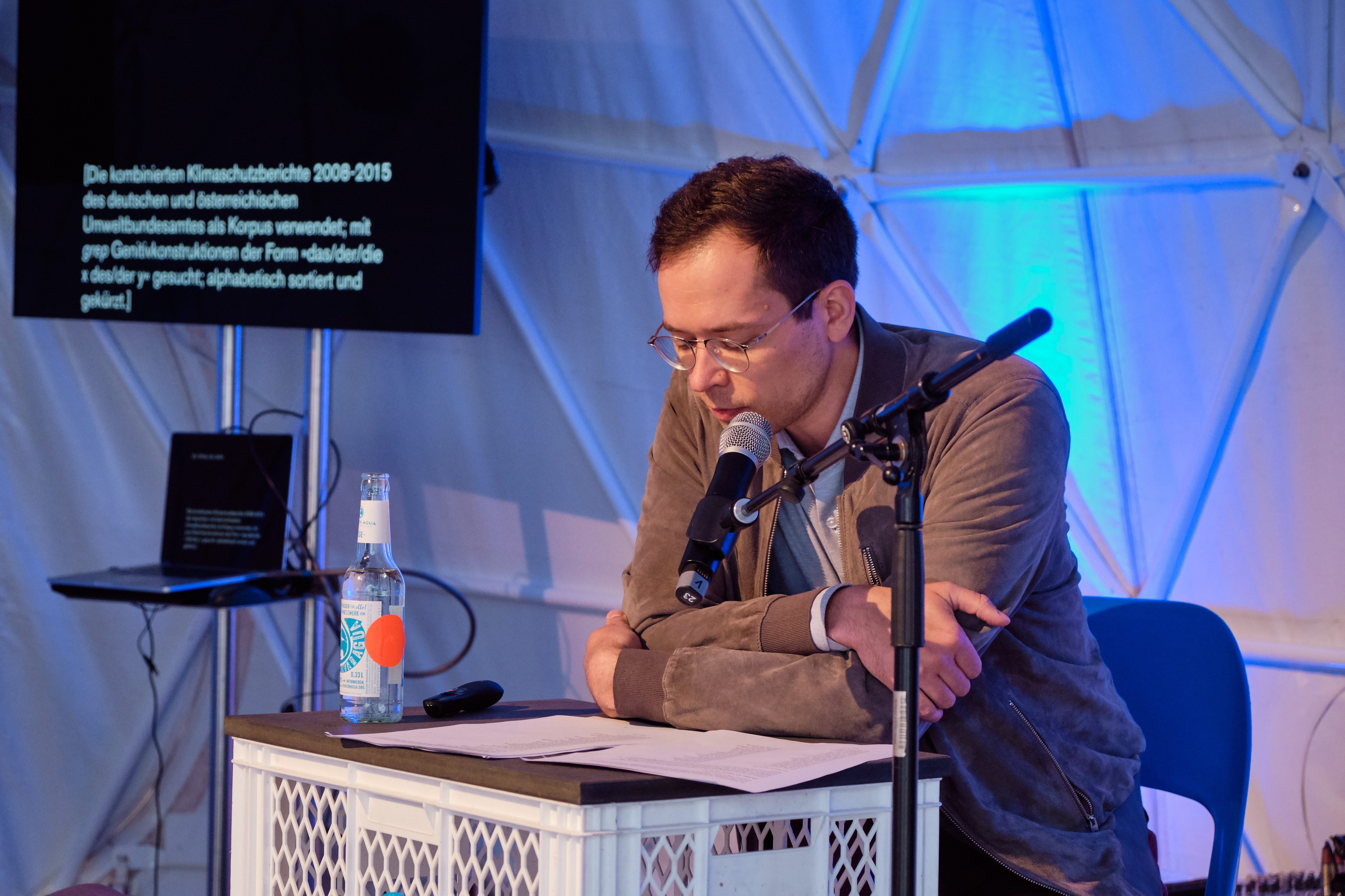 5. Mai 2019, Berlin: Netzfest19, Tag 2: Hannes Bajohr